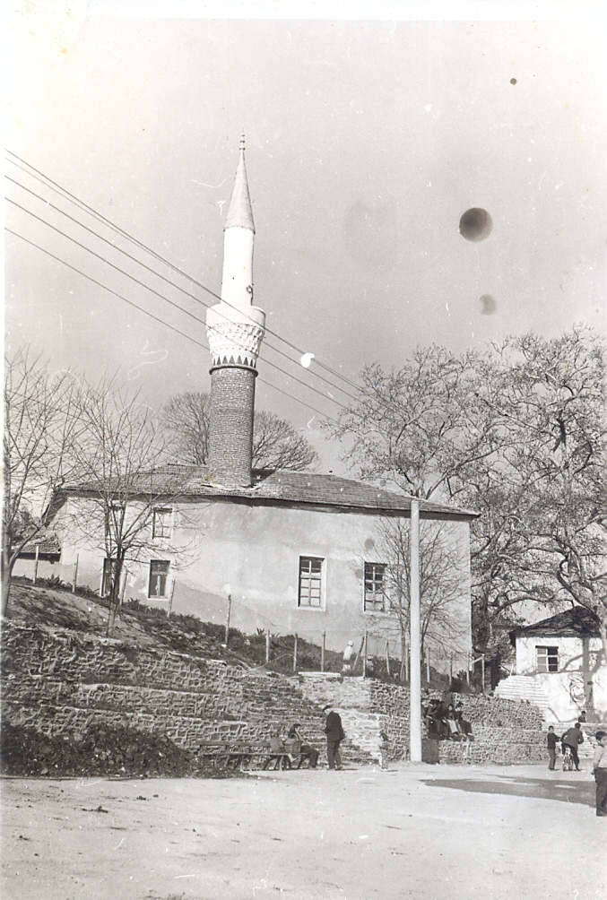 Излед от площада - центъра на с. Вълкосел на старата джамия. По време на комунистическият режим джамията е съборена. На нейно място е построена нова след промените в България.